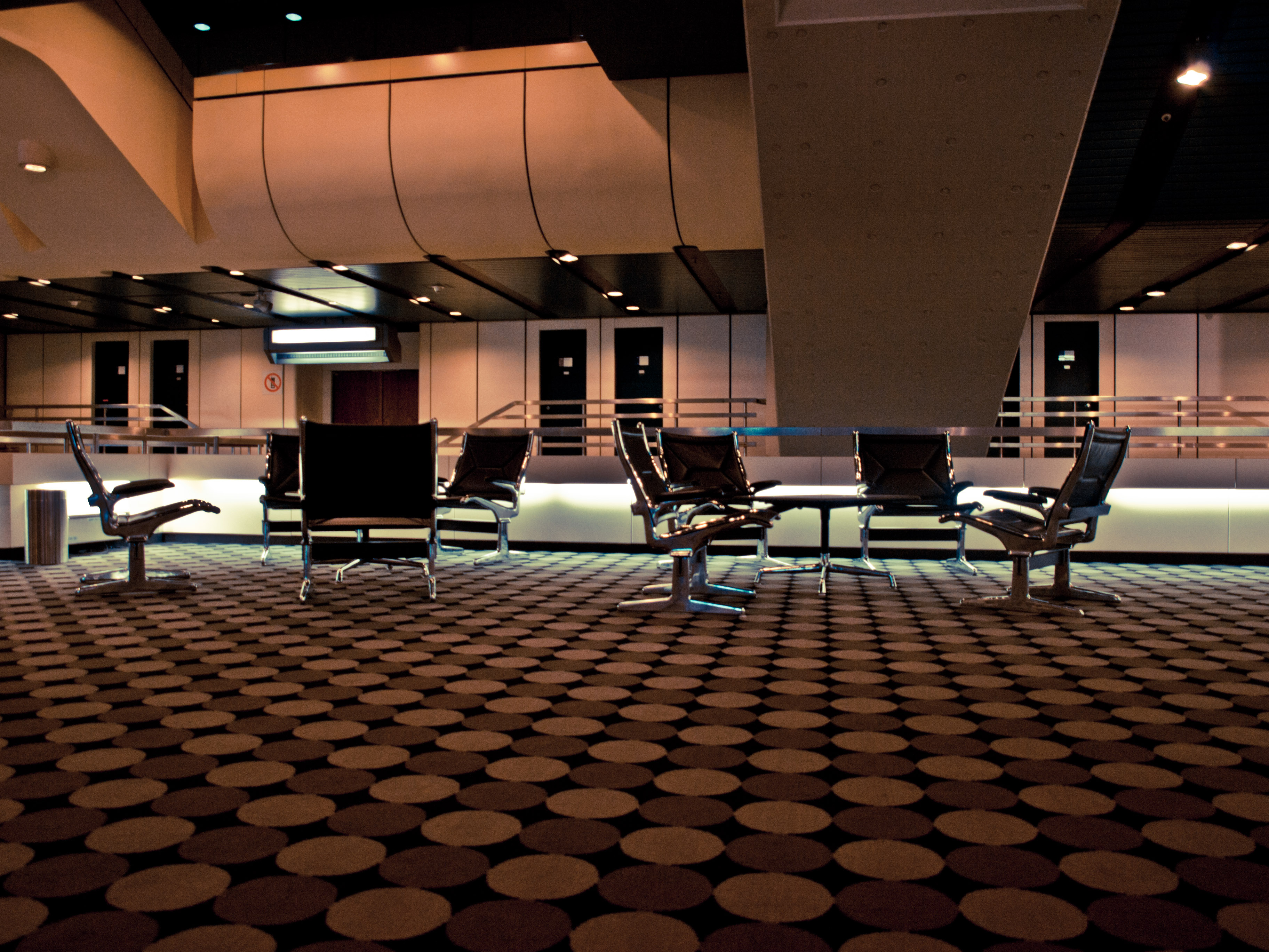 ./meeting